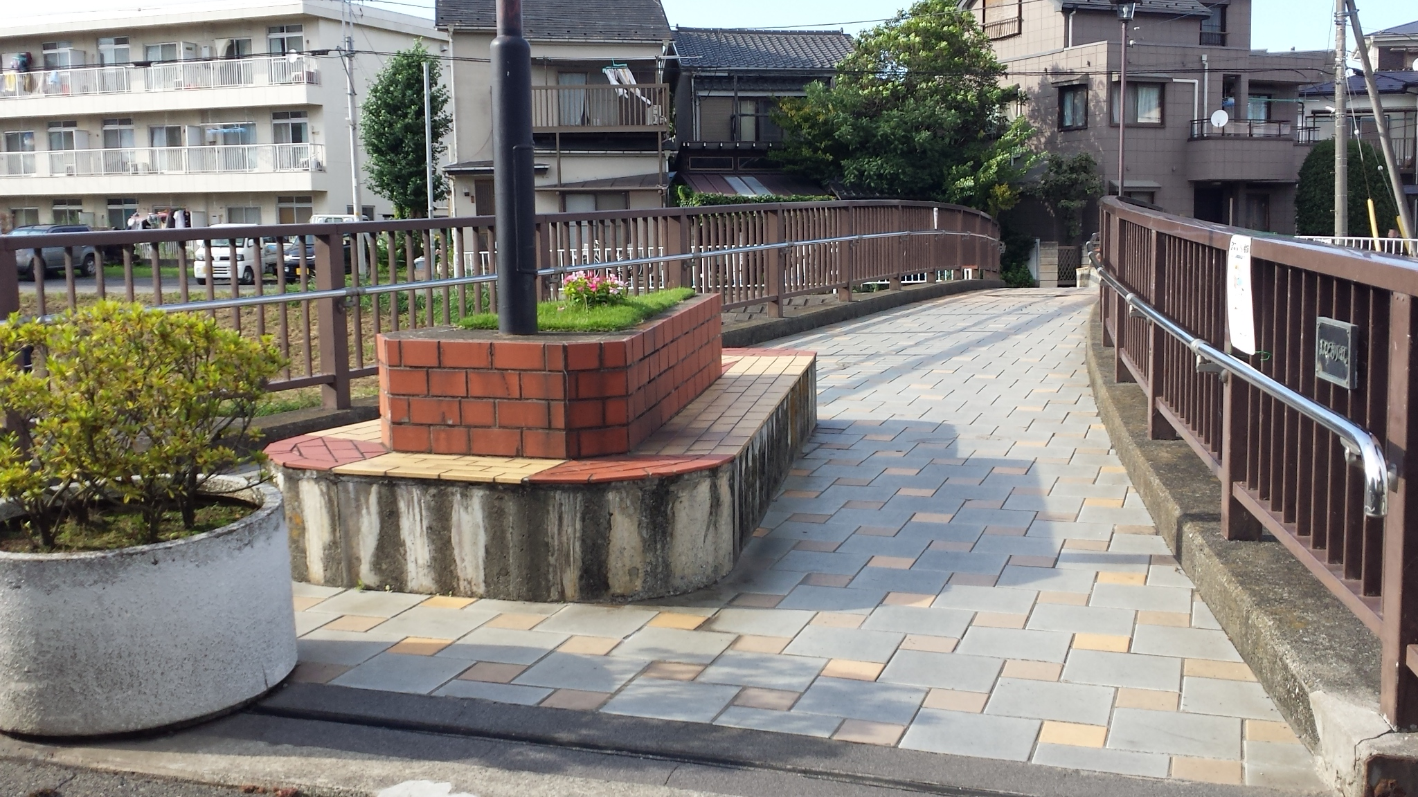 中文（中国大陆）: 《四月是你的谎言》OP1中出现的场景